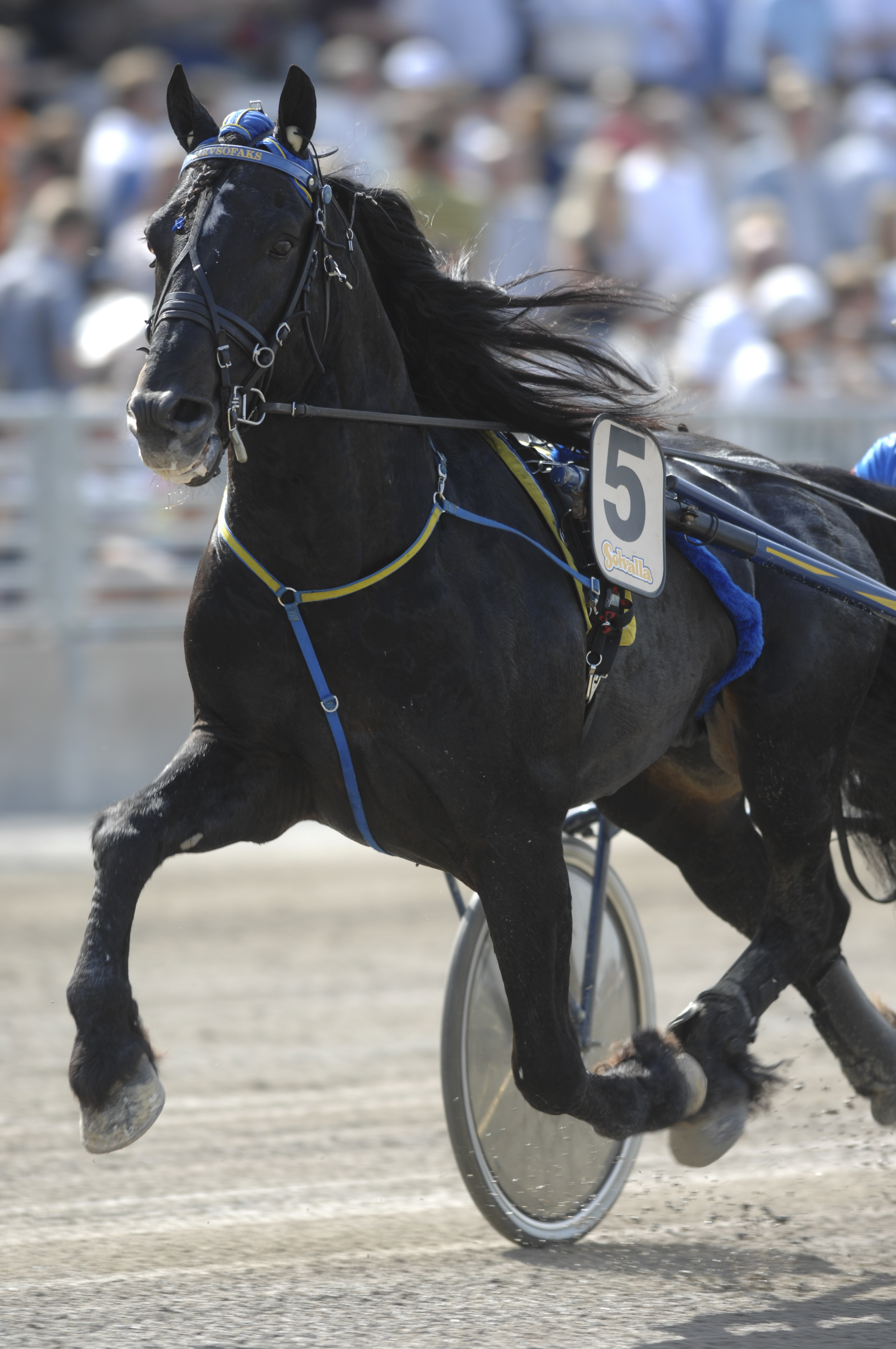 Kallblodstravaren Järvsöfaks.